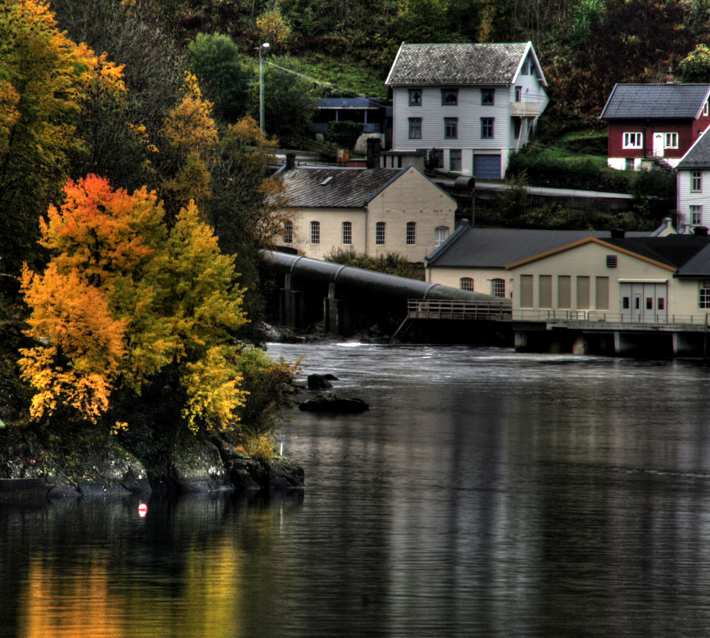 Tysse i Samnanger